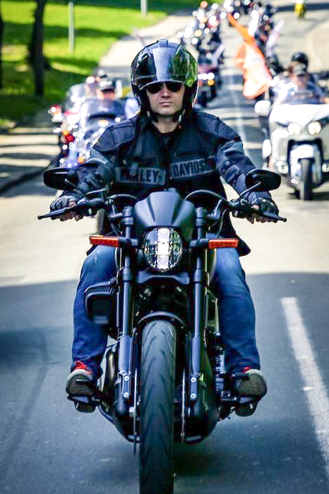 Микола Поворозник на фестивалі MotoOpenFest-2019